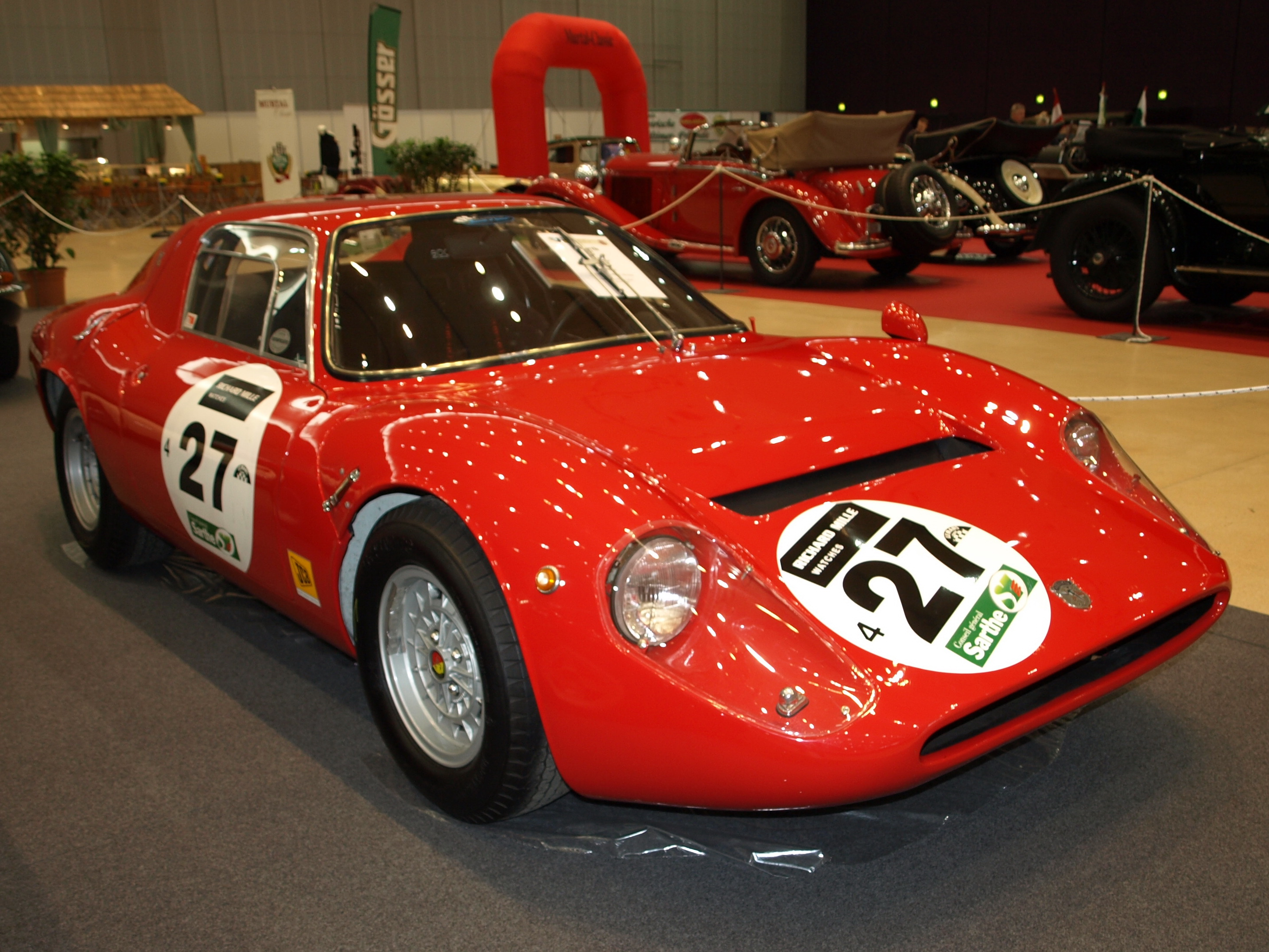 Oldtimer & Sportwagen Messe Graz 2011